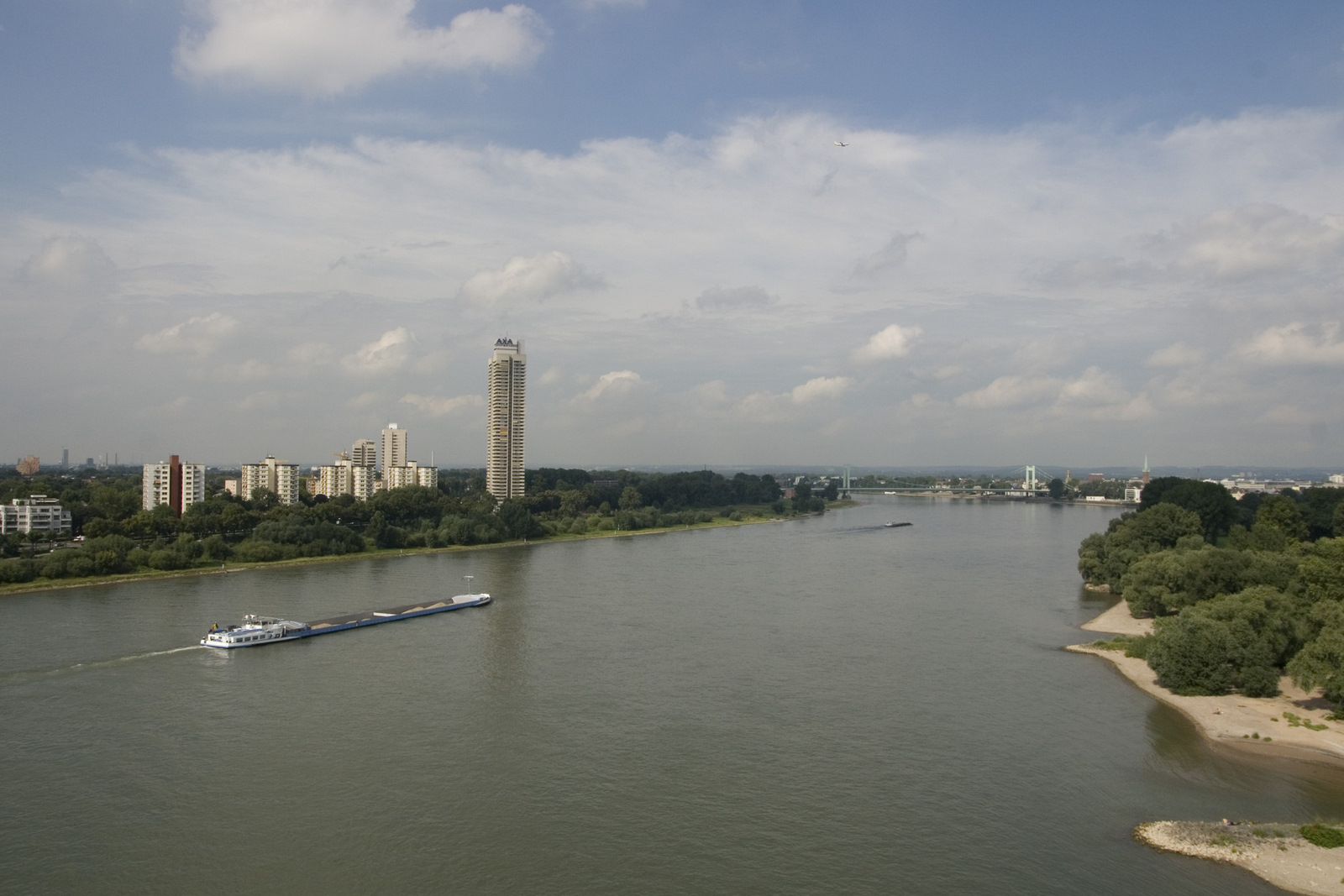 Река Рейн в Кёльне